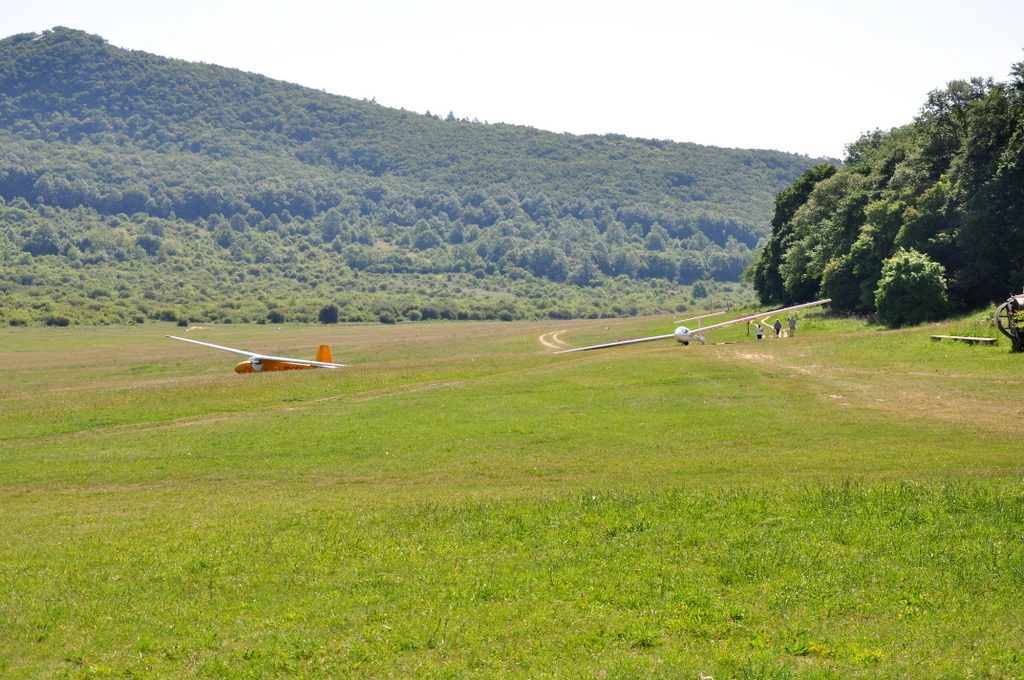 Hármashatárhegy Airfield, Budapest, Hungary